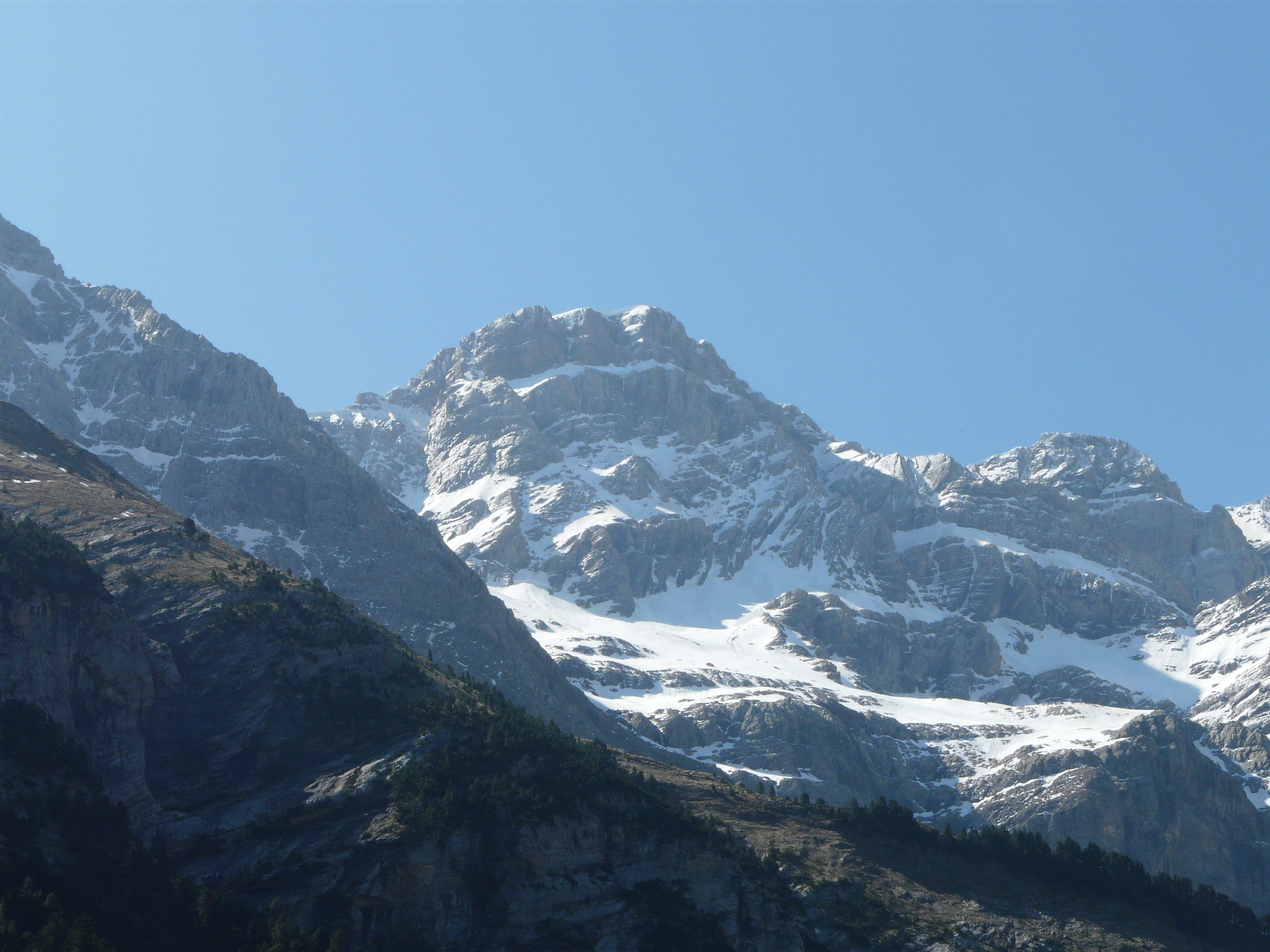 Le pic du Marboré (3248 m), Cirque de Gavarnie, Hautes-Pyrénées, France.